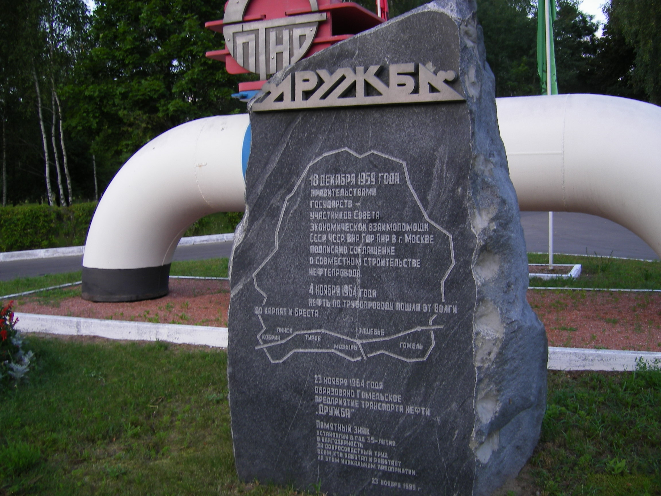 A Barátság kőolajvezeték Mazir közelében (Belarusz)